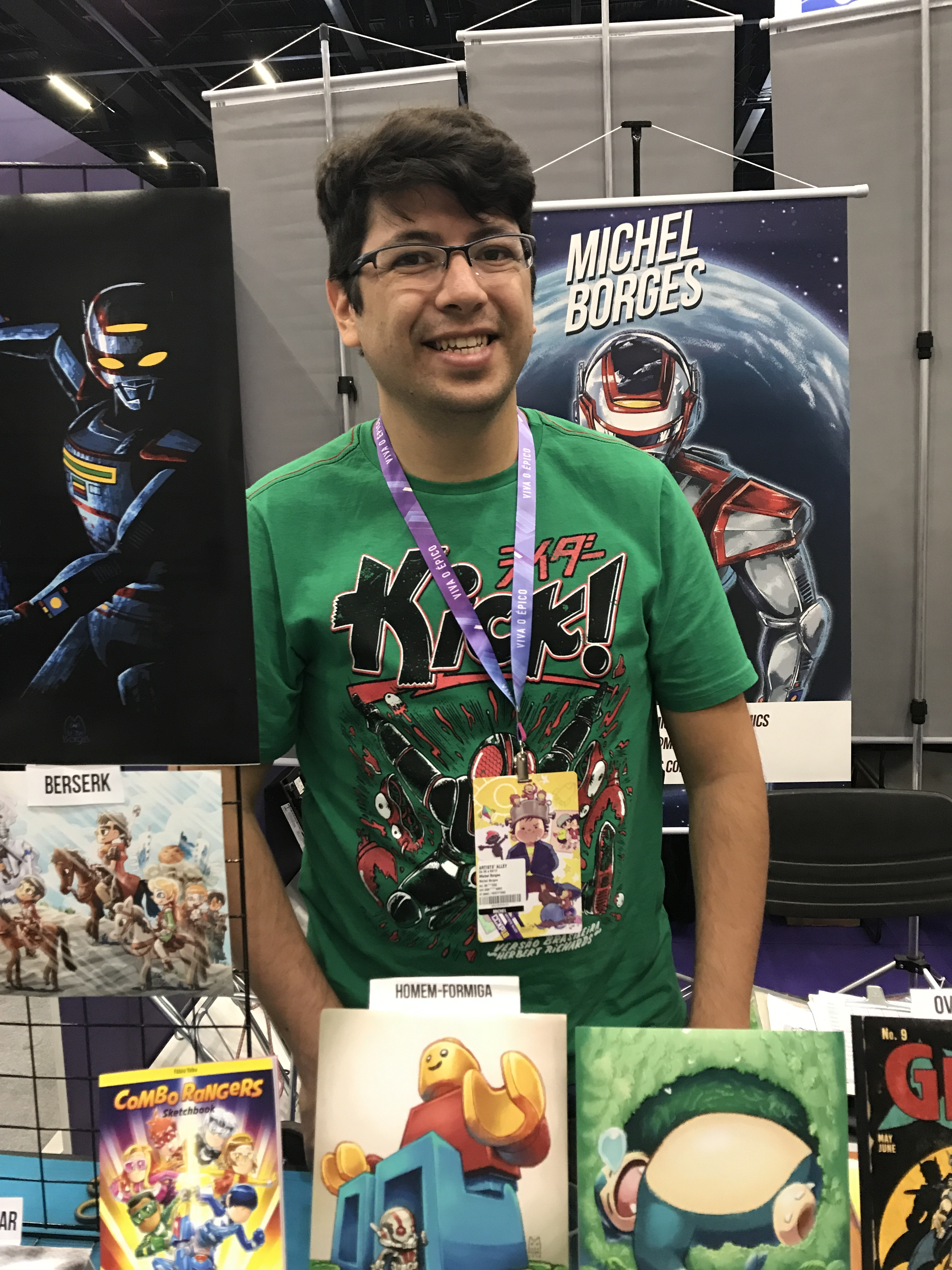 Artista Michel Borges na edição de 2018 da Comic Con Experience.